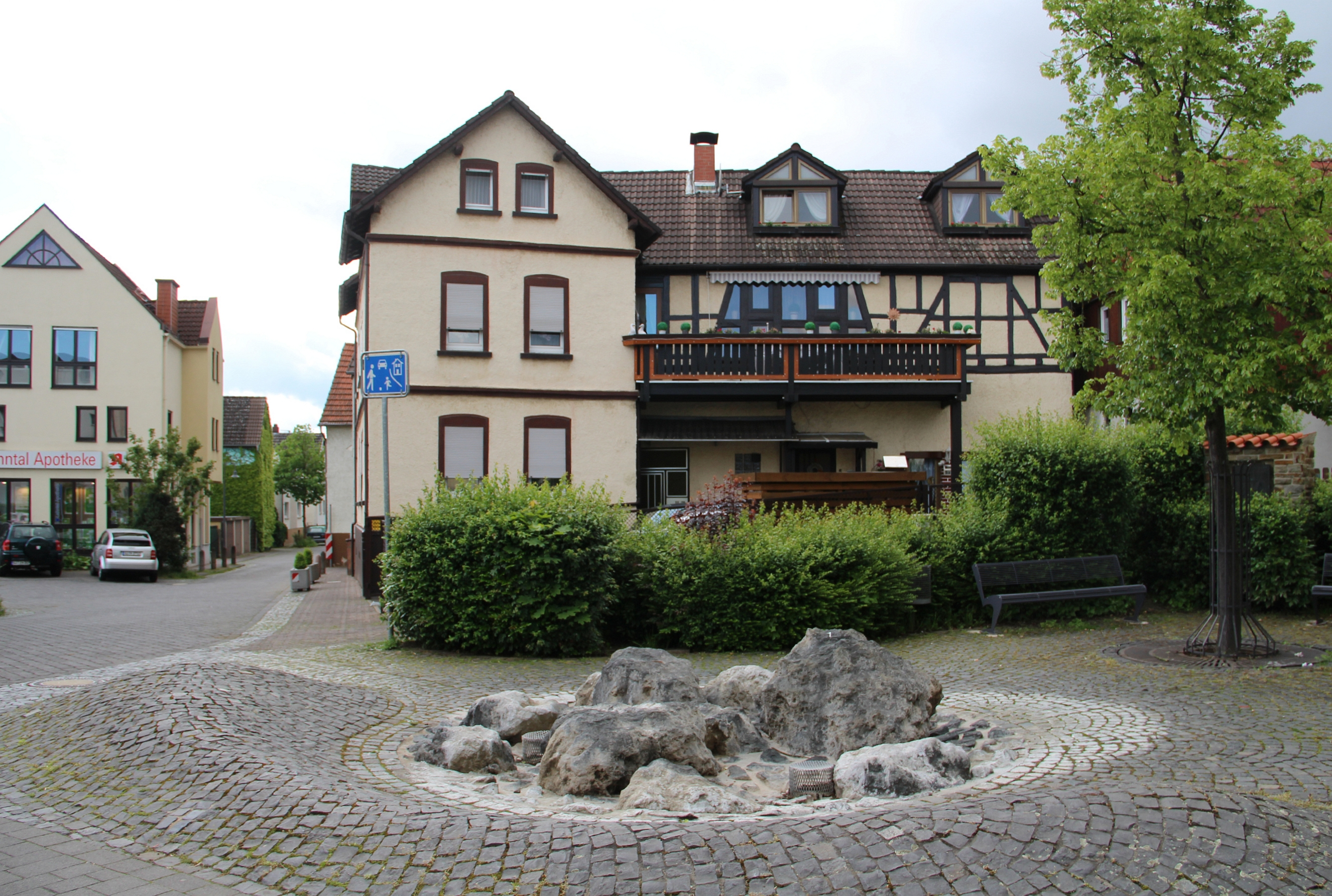 Keulerbrunnen